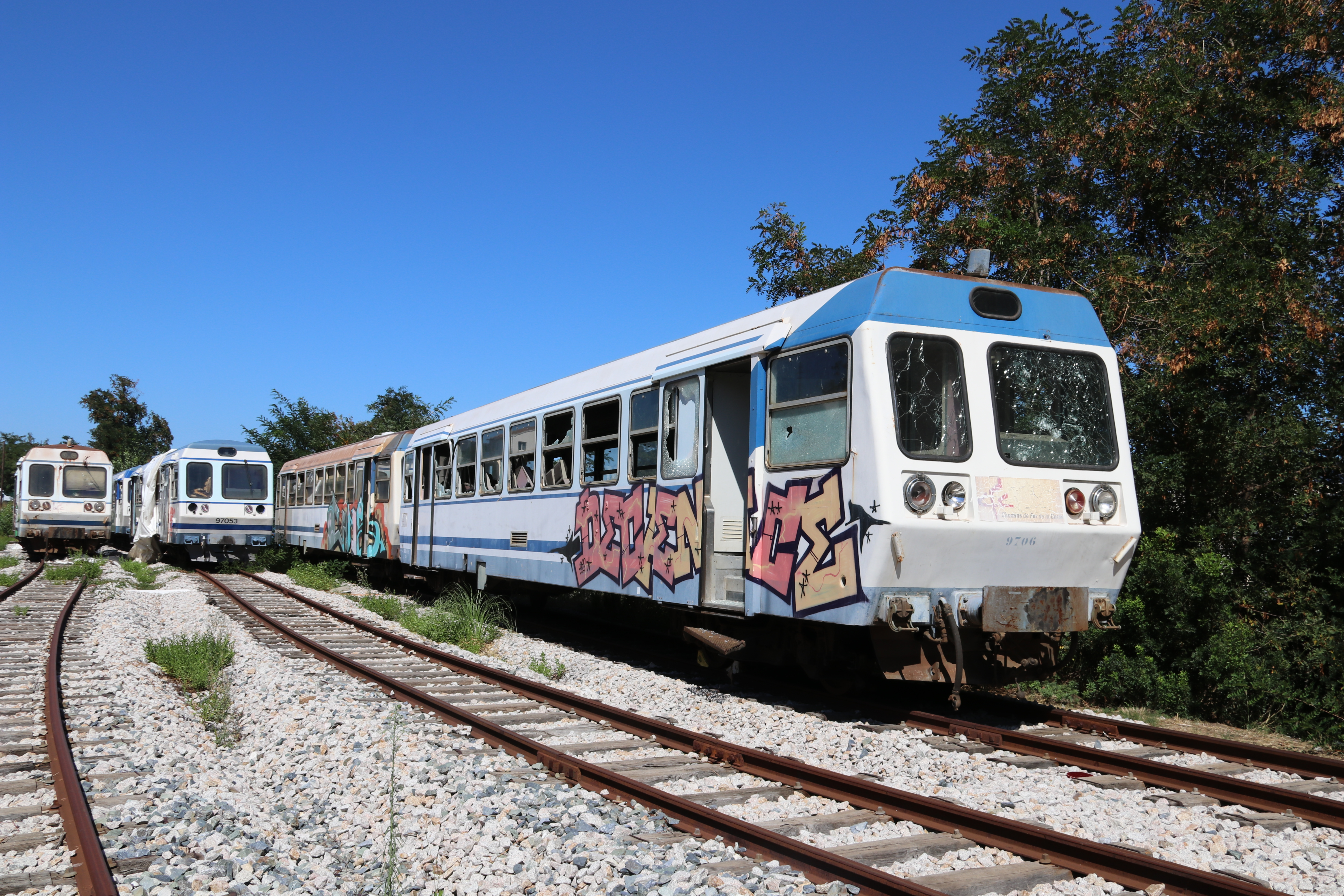 Soulé-Trieb-und Steuerwagen 97052_9703-97053_9704-9706 warten vor der Hauptwerkstätte Casamozza auf ihr weiteres Schicksal.